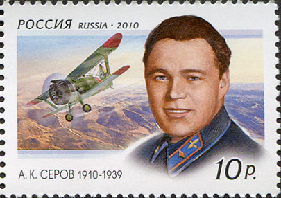 Почтовая марка России - Серов Анатолий Константинович, Герой Советского Союза